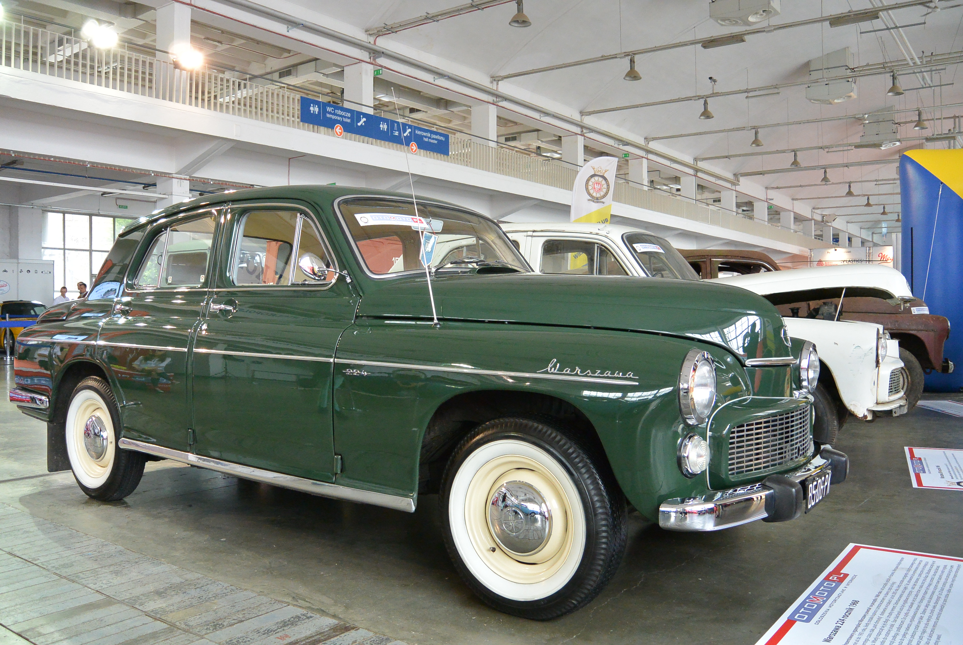 FSO Warszawa 224 rocznik 1968 podczas Motor Show Poznań 2014.